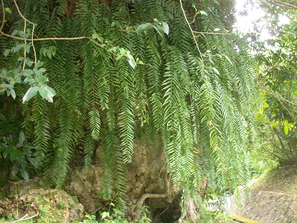 Nephrolepis biserrata ホウビカンジュ 沖縄県那覇市：2004.08.13撮影